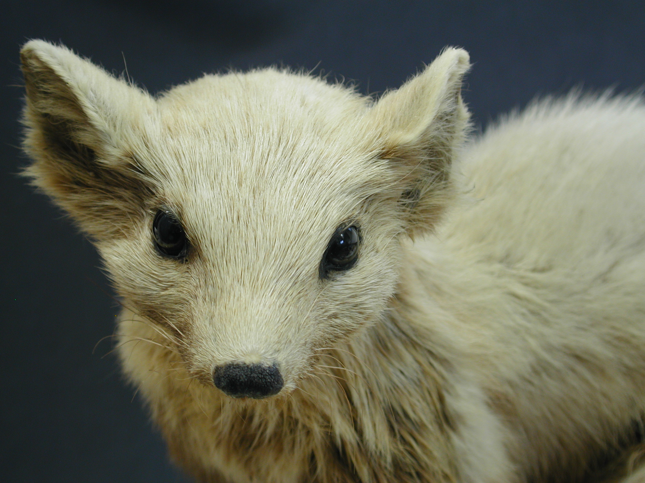 Taxidermie - Martes martes